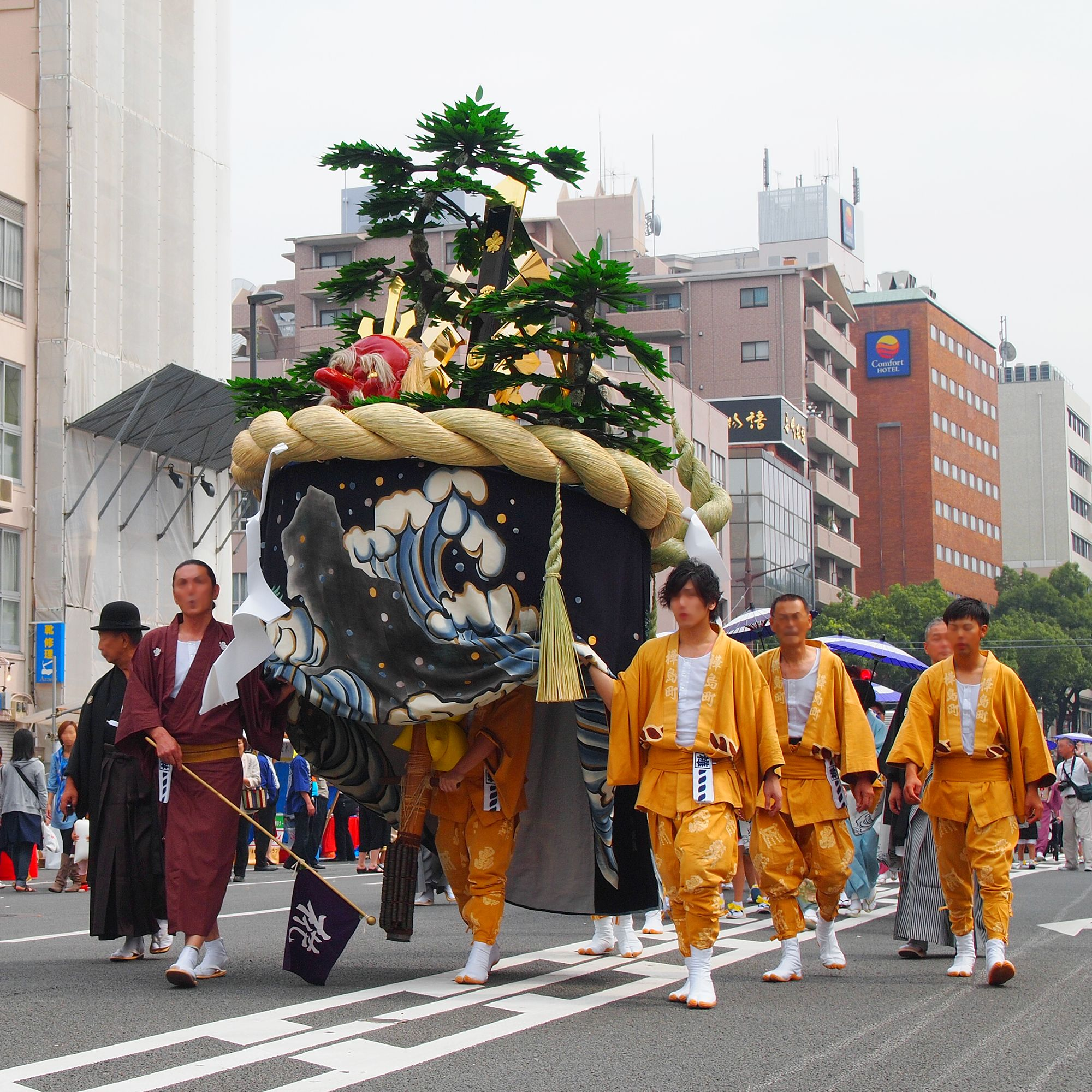 長崎くんちにて奉納される傘鉾。